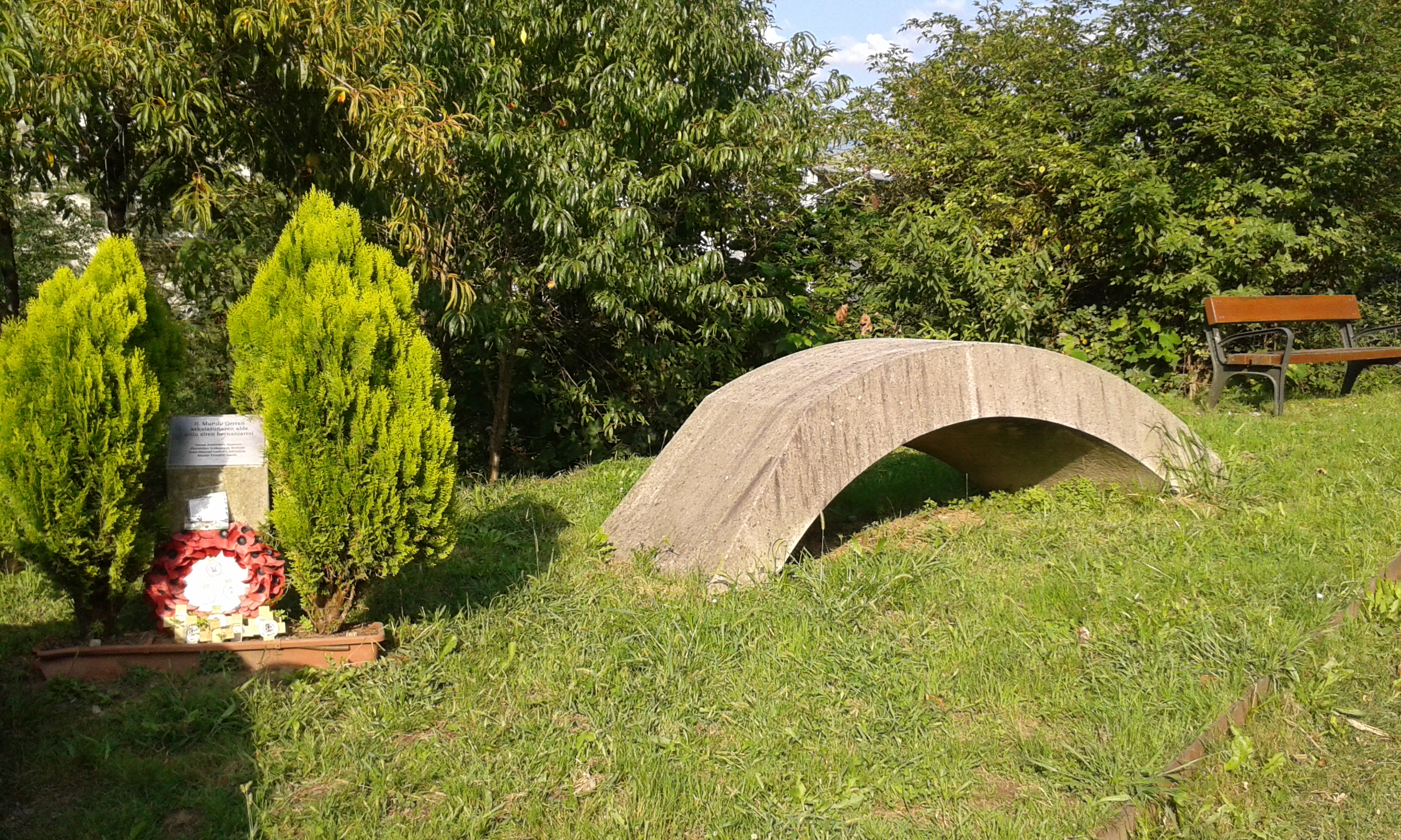 Bigarren Mundu Gerran Askatasunaren alde aritu ziren hernaniarrei monumentua